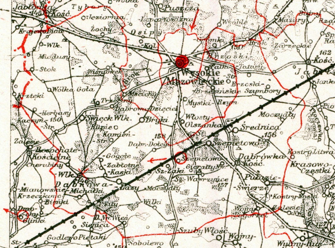 Jest to fragment mapy administracyjnej Rzeczypospolitej Polskiej z 1937 roku. Siedziba gminy Szepietowo została przeniesiona z Dąbrowy Wielkiej do Szepietowa w 1946 roku.